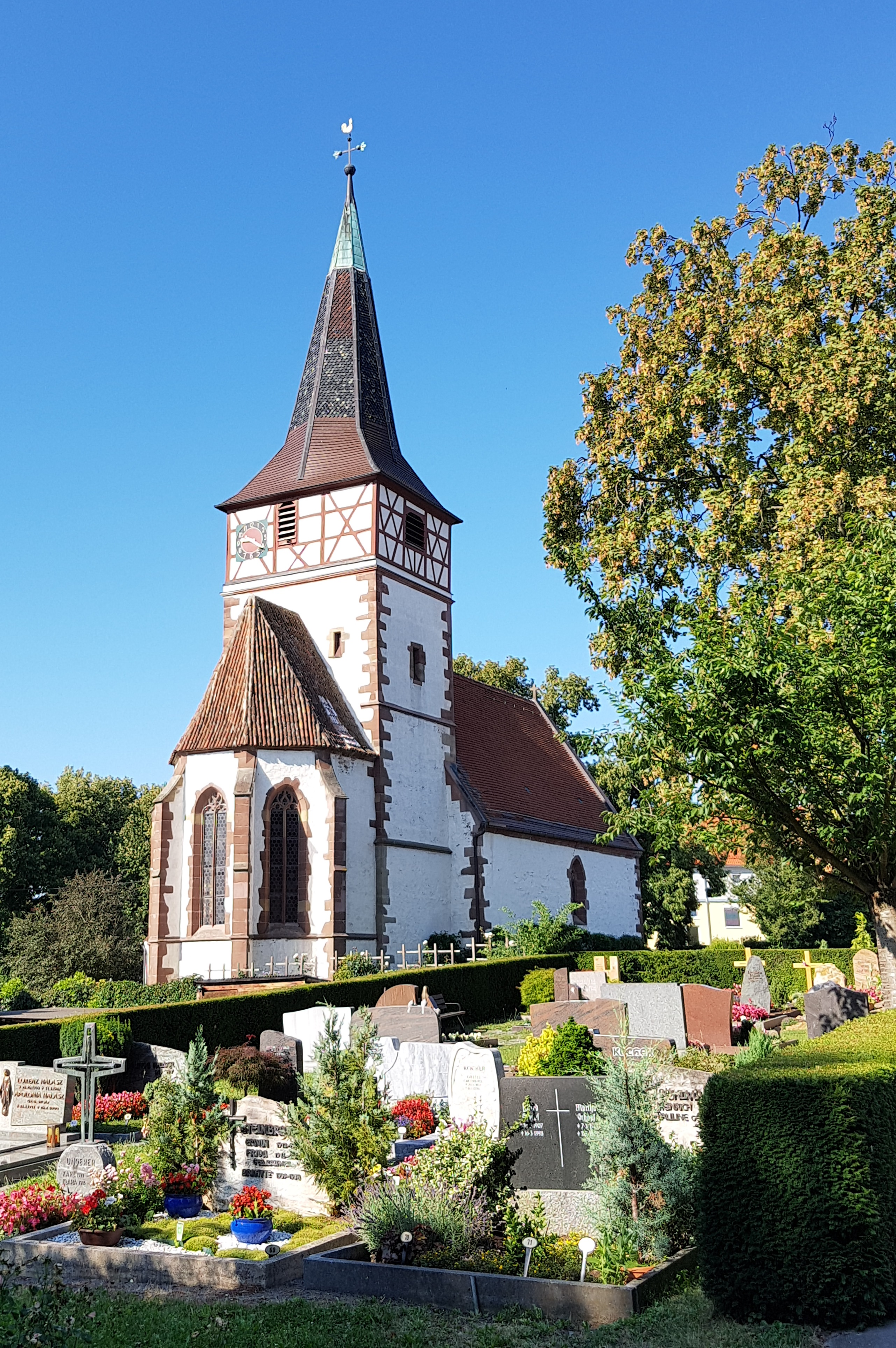 Ditzingen, Speyrer Kirche